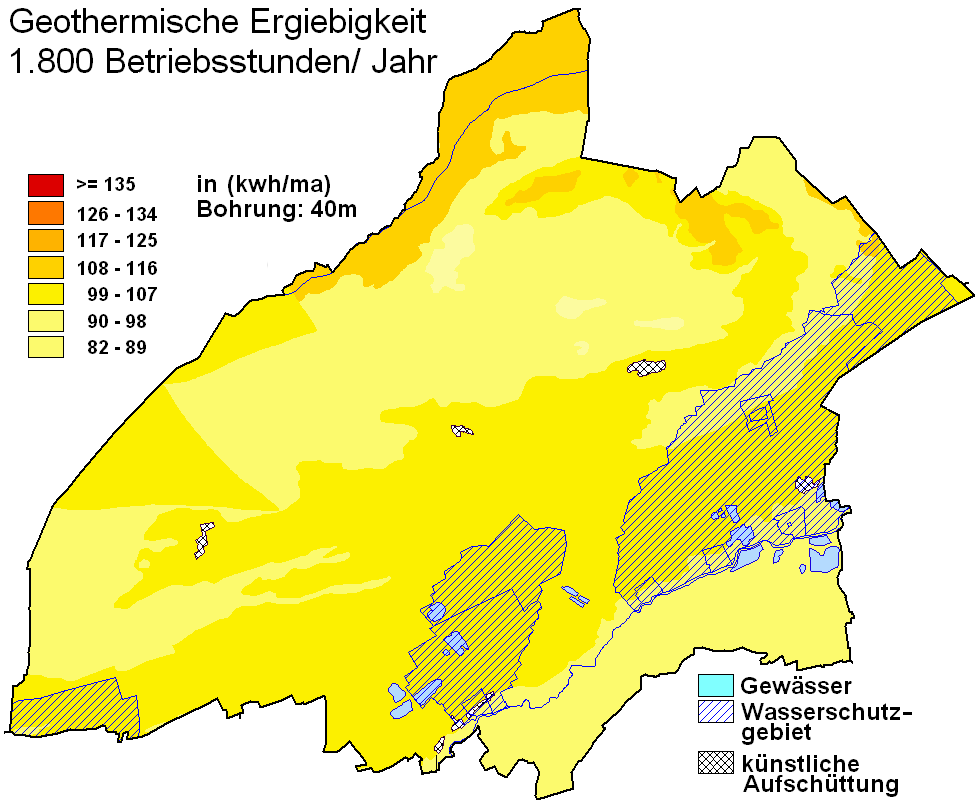 geothermische Karte Delbrück, Kreis Paderborn. Deutschland